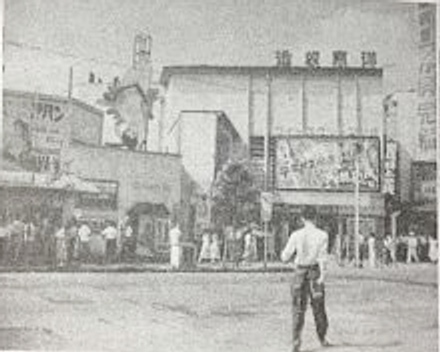 池袋東洋劇場と池袋アバン座、1954年